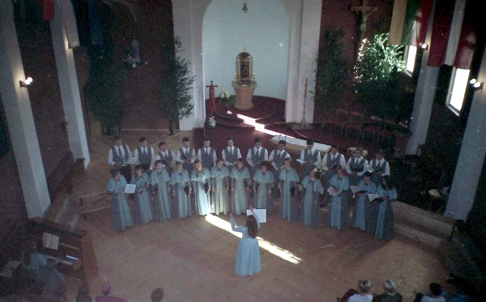 Šiaulių Šv. Ignaco bažnyčios choras, vadovė Marija Žibūdienė